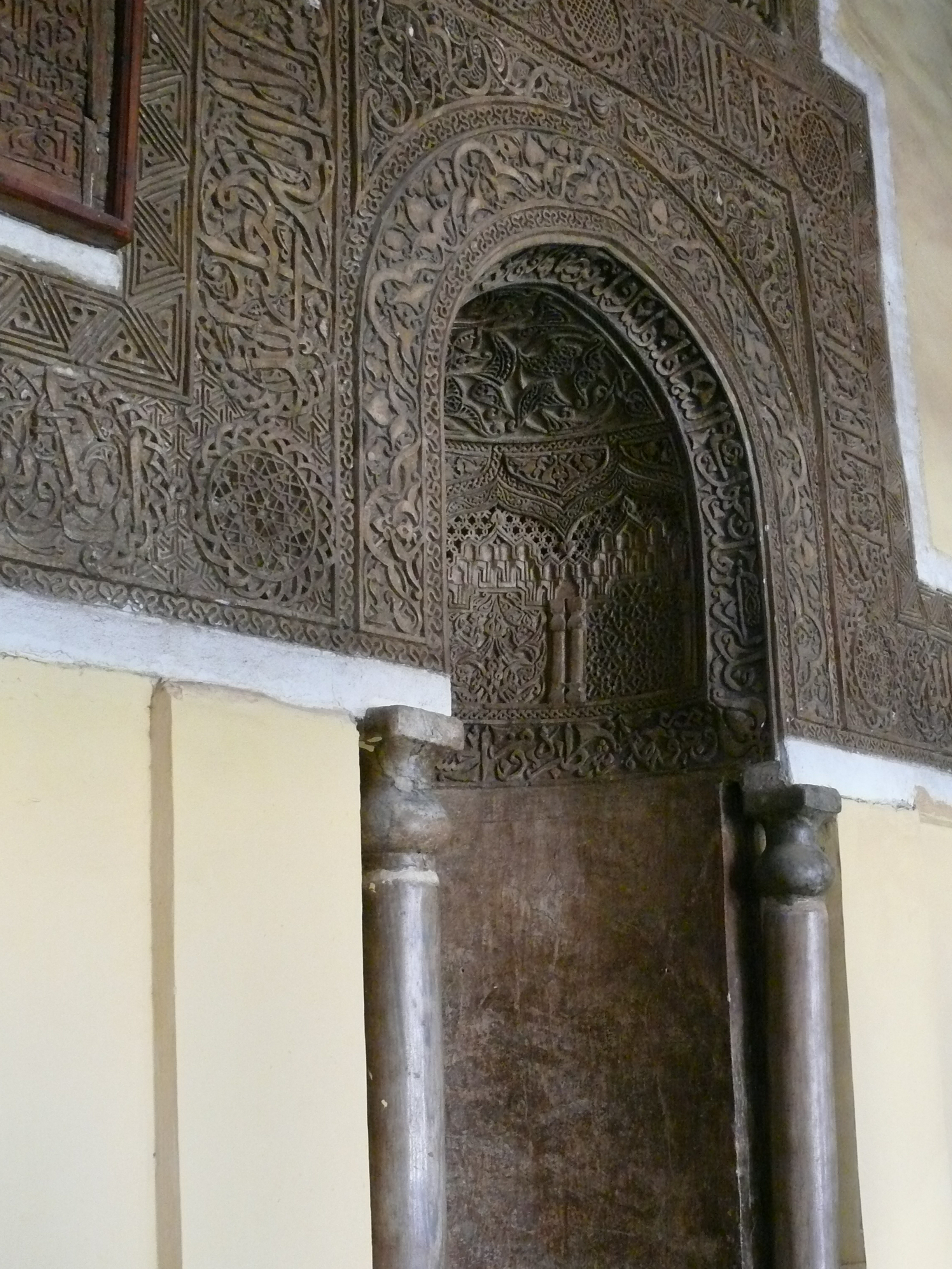 Qus (Ägyten) Mihrab